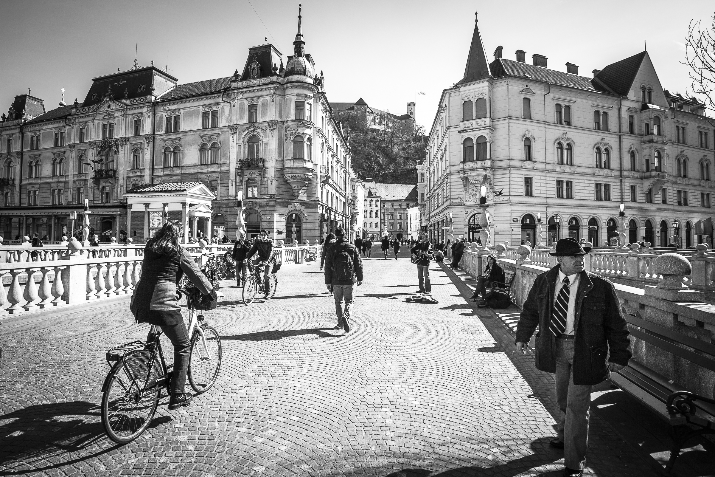 Gente a Lubiana